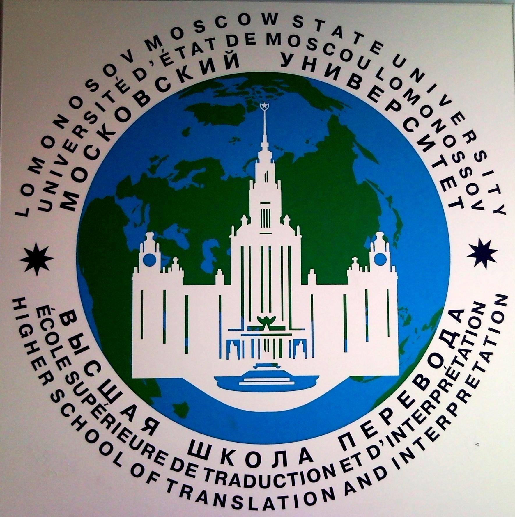 Герб ВШП МГУ